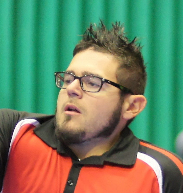 Tomas Pinas (ESP)